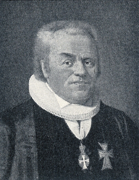 Peter Outzen Boisen. 1762-1831. Biskop for Lolland-Falsters stift.